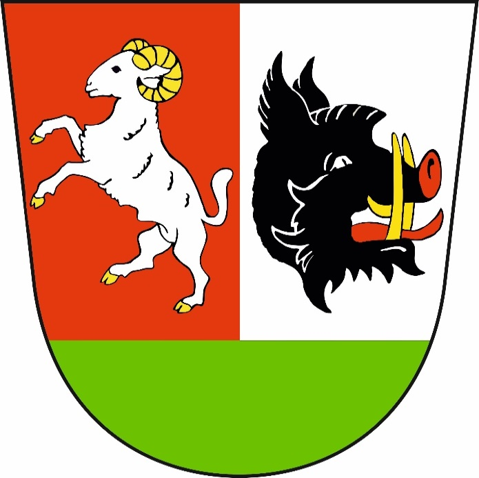 V červeno-stříbrně polceném štítě se zelenou patou vpravo stříbrný beran se zlatou zbrojí ve skoku, vlevo doleva obrácená černá kančí hlava se zlatými kly a červeným rypákem a jazykem.